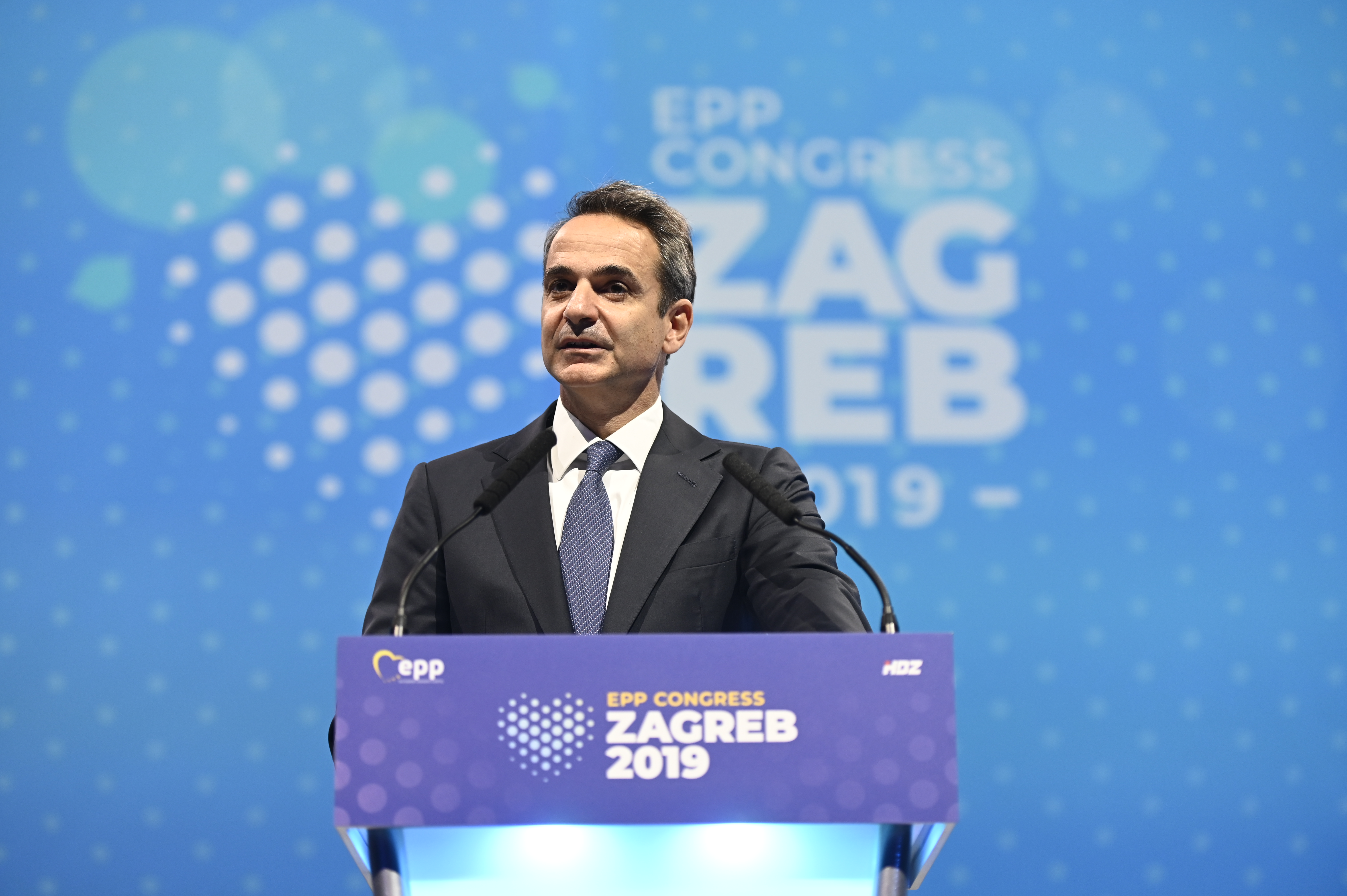 20-21 November 2019